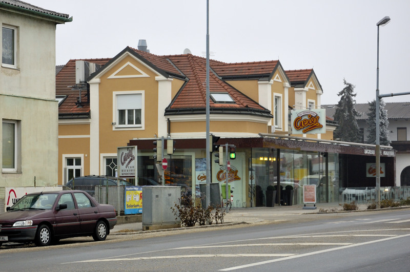 Strasshof an der Nordbahn, Hauptstraße